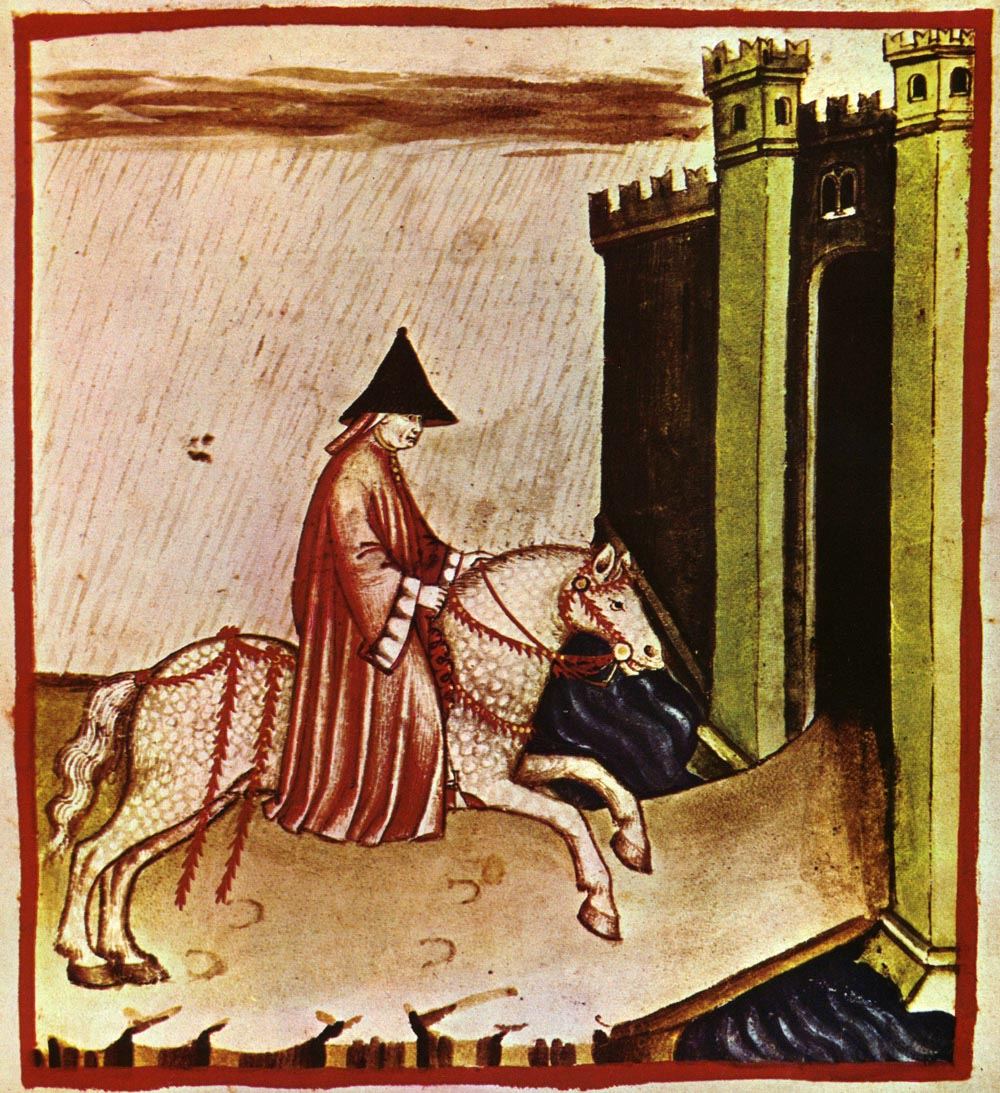 Taccuino Sanitatis, Casanatense